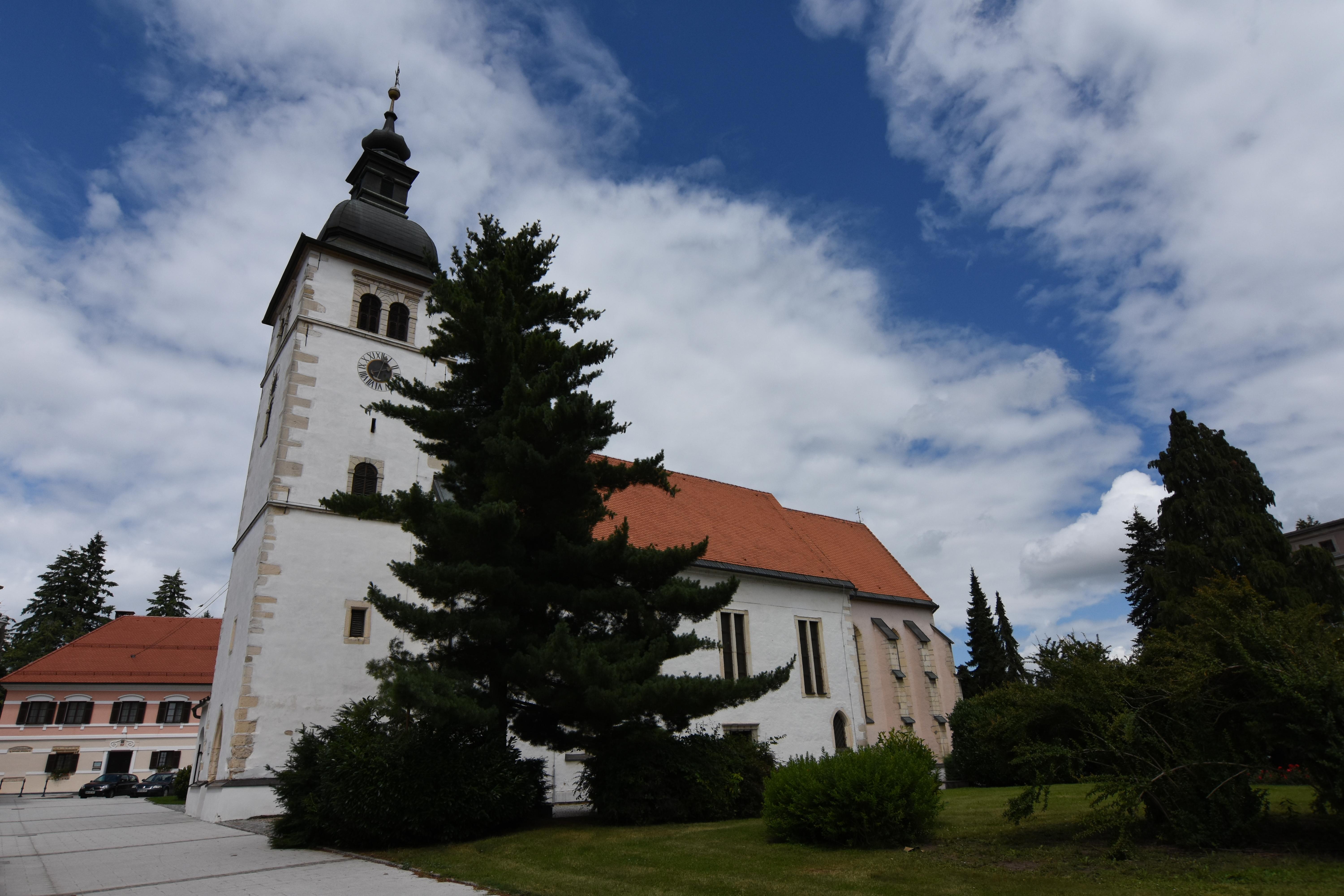 Župnijska cerkev sv. Jakoba Ormož